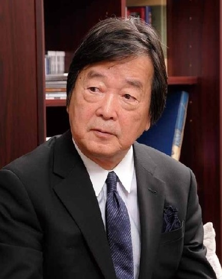 田中 均